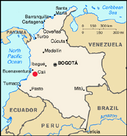 Colombia (cali)